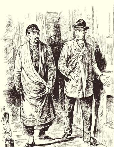 Раскольников и мещанин. Иллюстрация к роману Достоевского "Преступление и наказание", художник В. Порфирьев, 1881